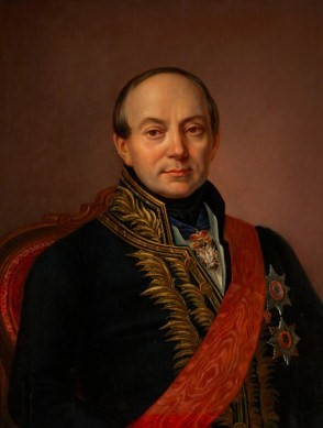 Ширинский-Шихматов, Платон Александрович